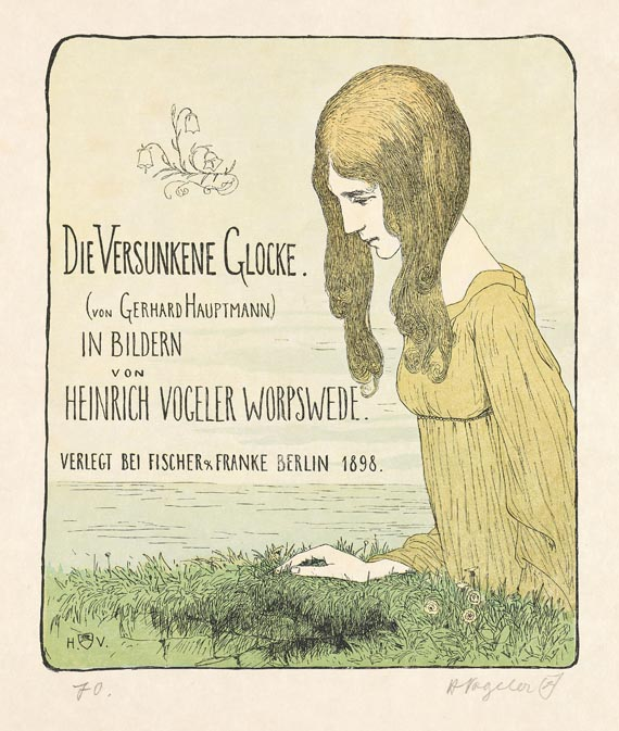 Gerhart Hauptmann: Die versunkene Glocke in Bildern von Heinrich Vogeler. Titel